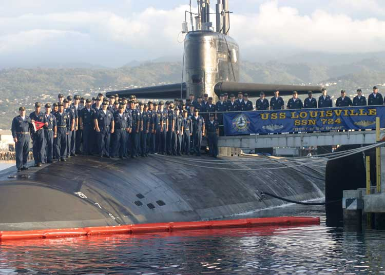 USS Louisville (SSN-724)